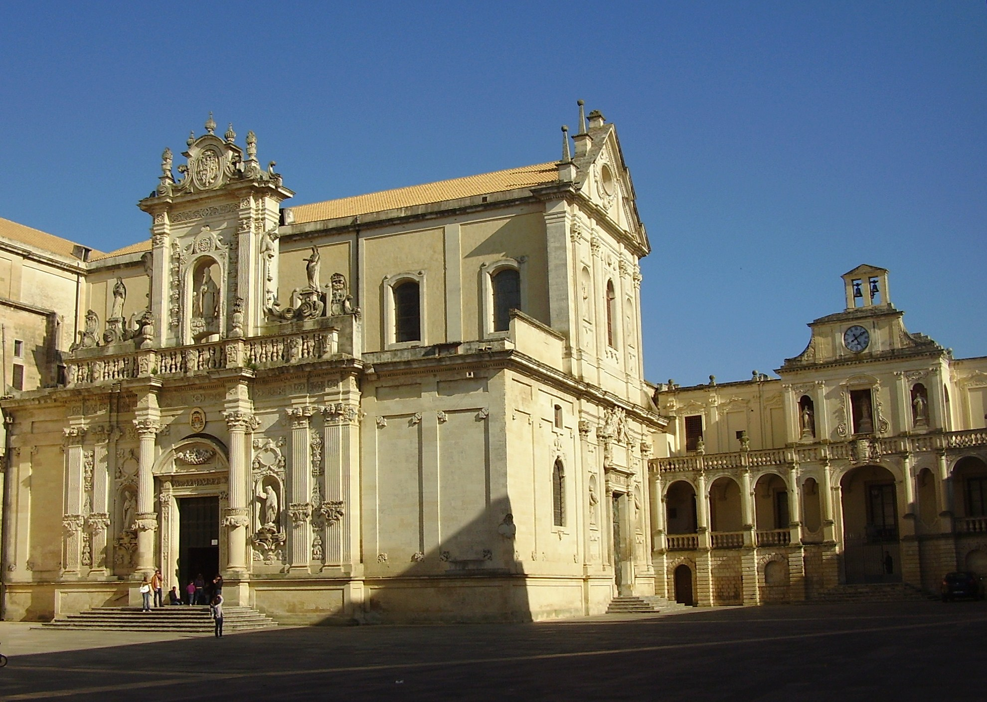 Duomo di Lecce dell'Assunta